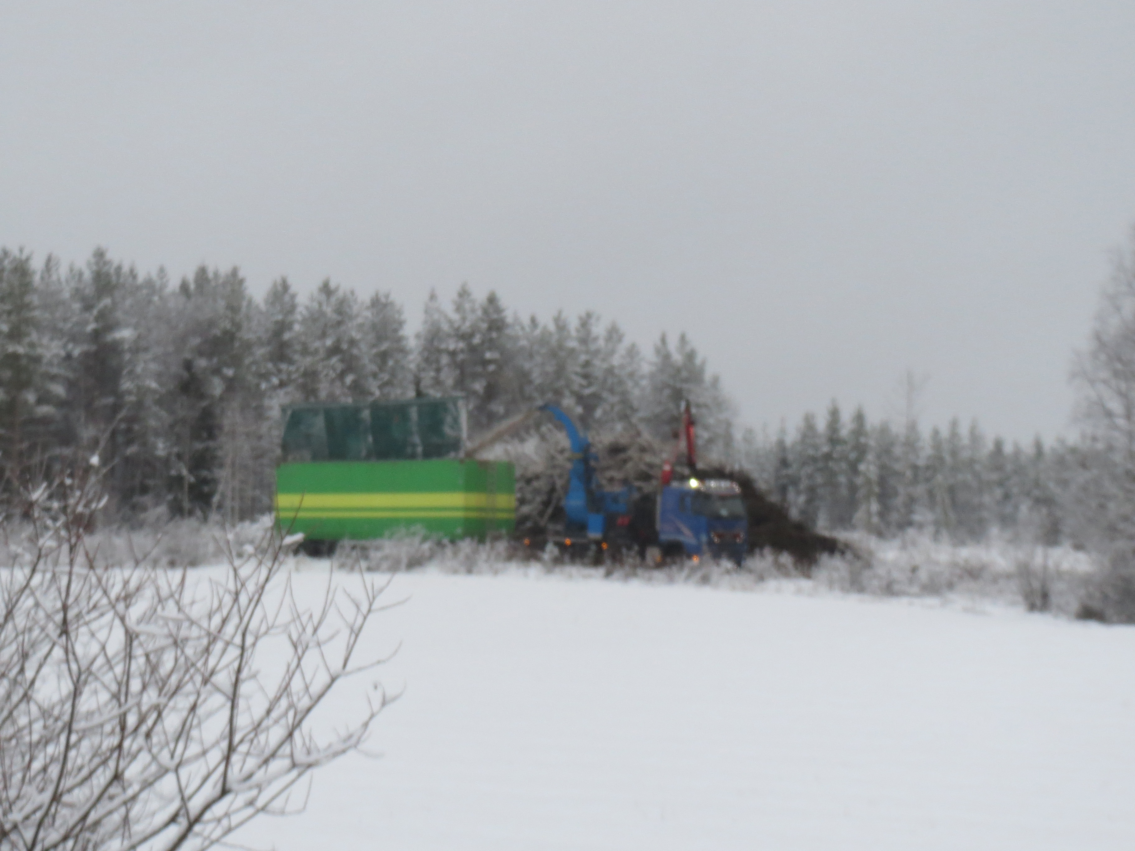 Hakkuutähde muuttuu puuhakkeeksi